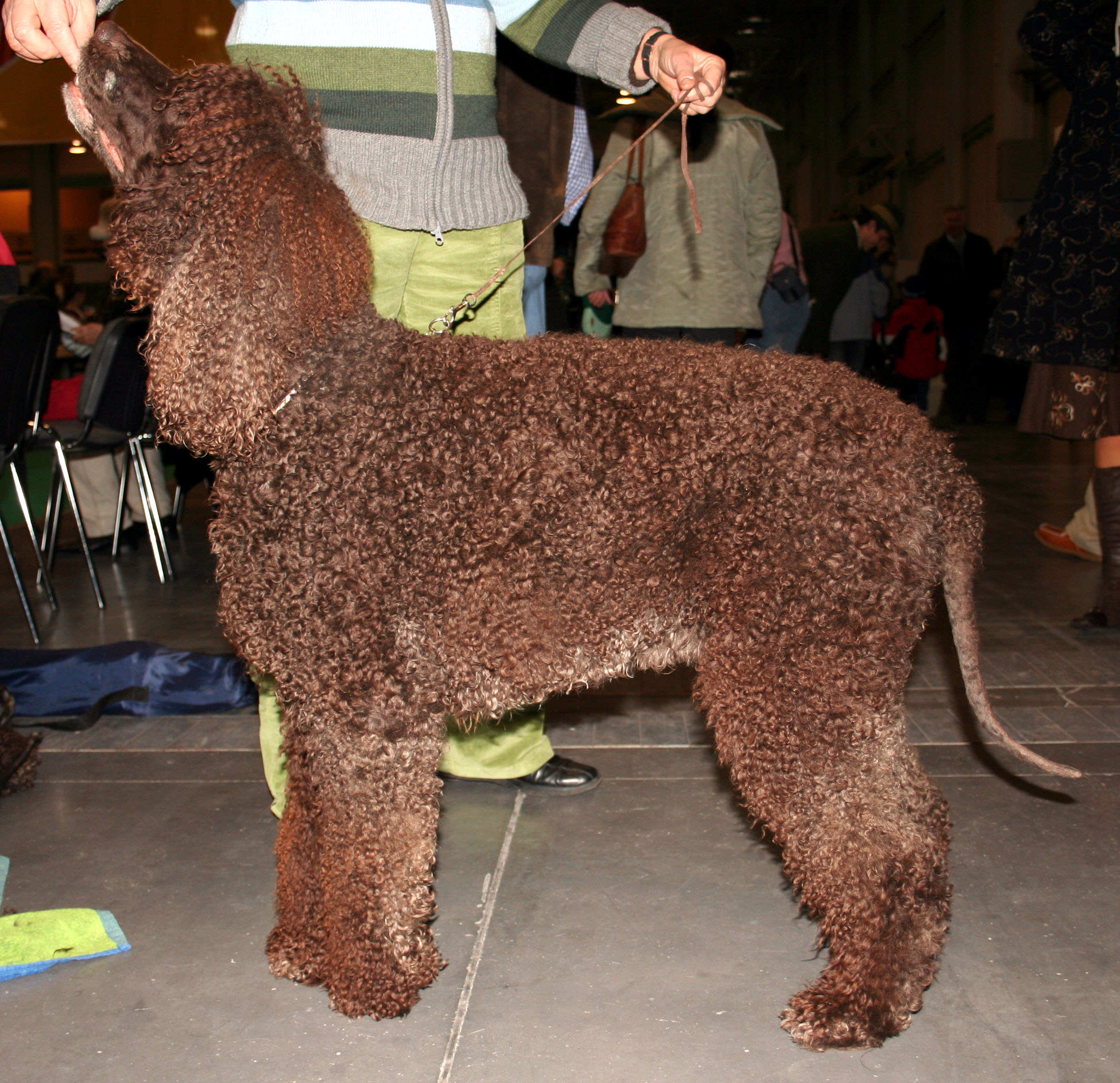 Irlandzki_spaniel_wodny na Światowej Wystawie Psów Rasowych w Poznaniu